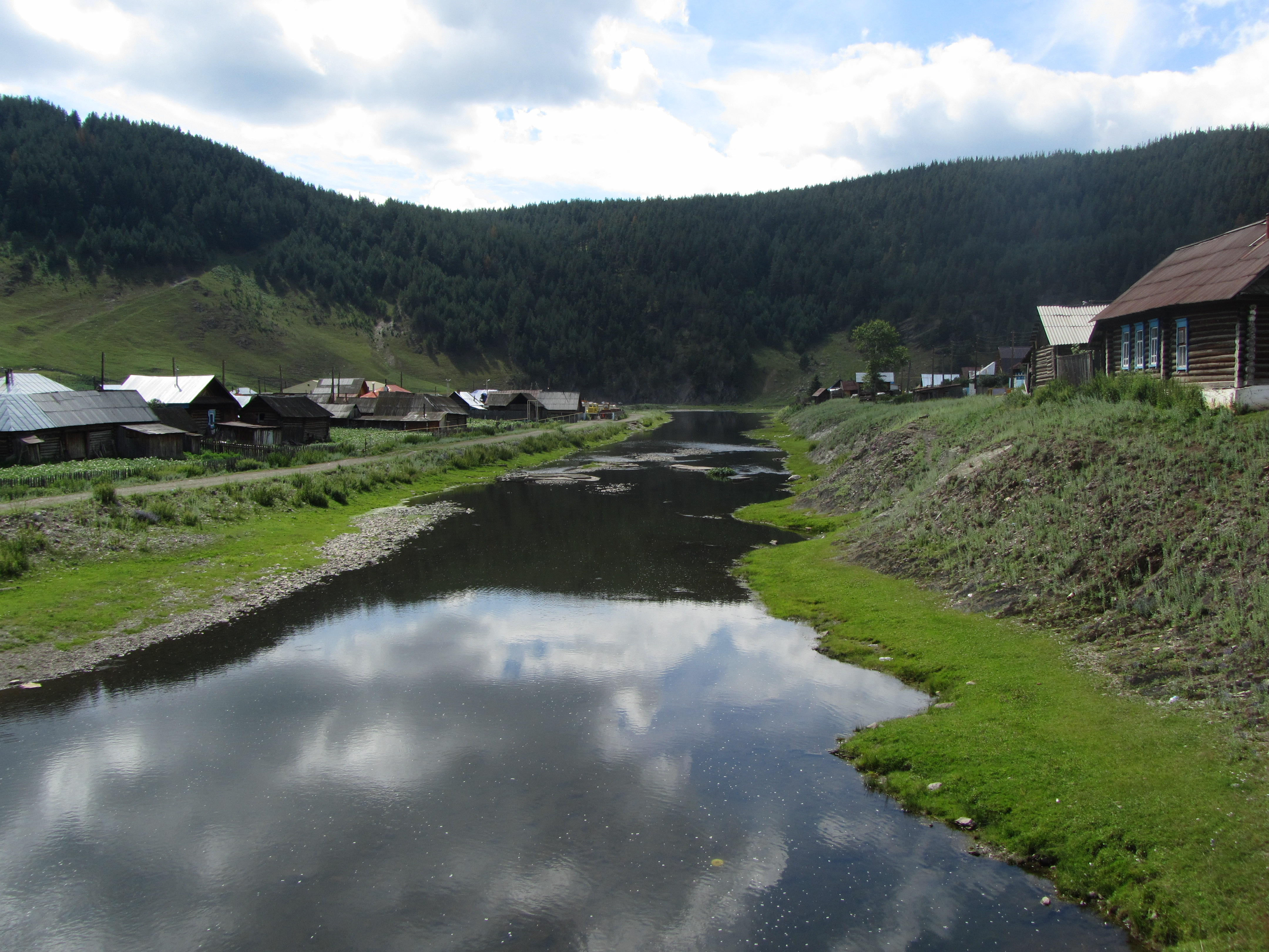 Башҡортса: Ҡағы йылғаһы